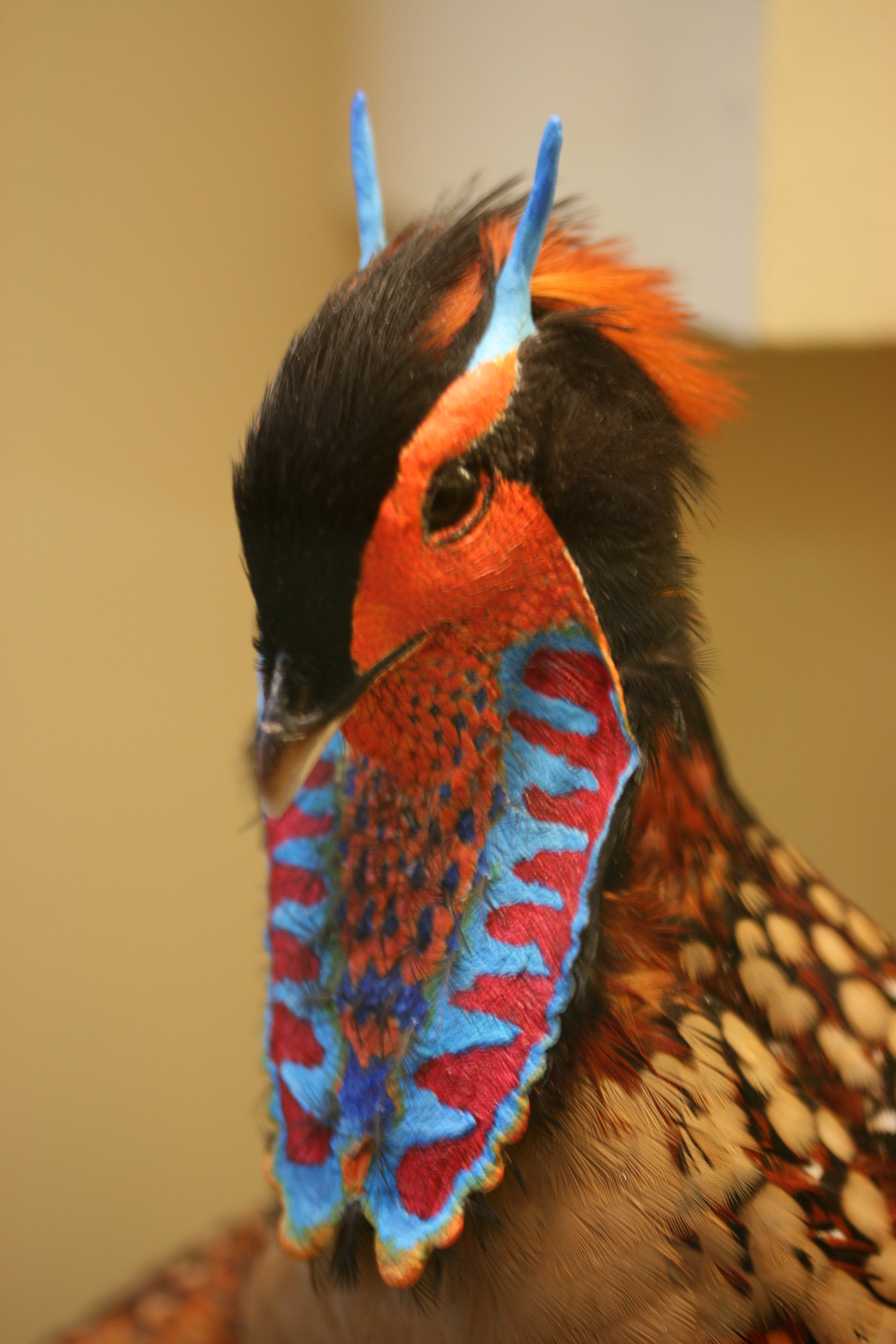 Cabottragopan